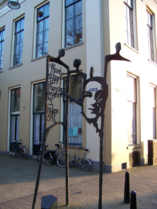 Kunstwerk ter herinnering aan Johannes van Vloten, aan de Grote Poot in Deventer. Gemaakt door Hans Mes (1996)